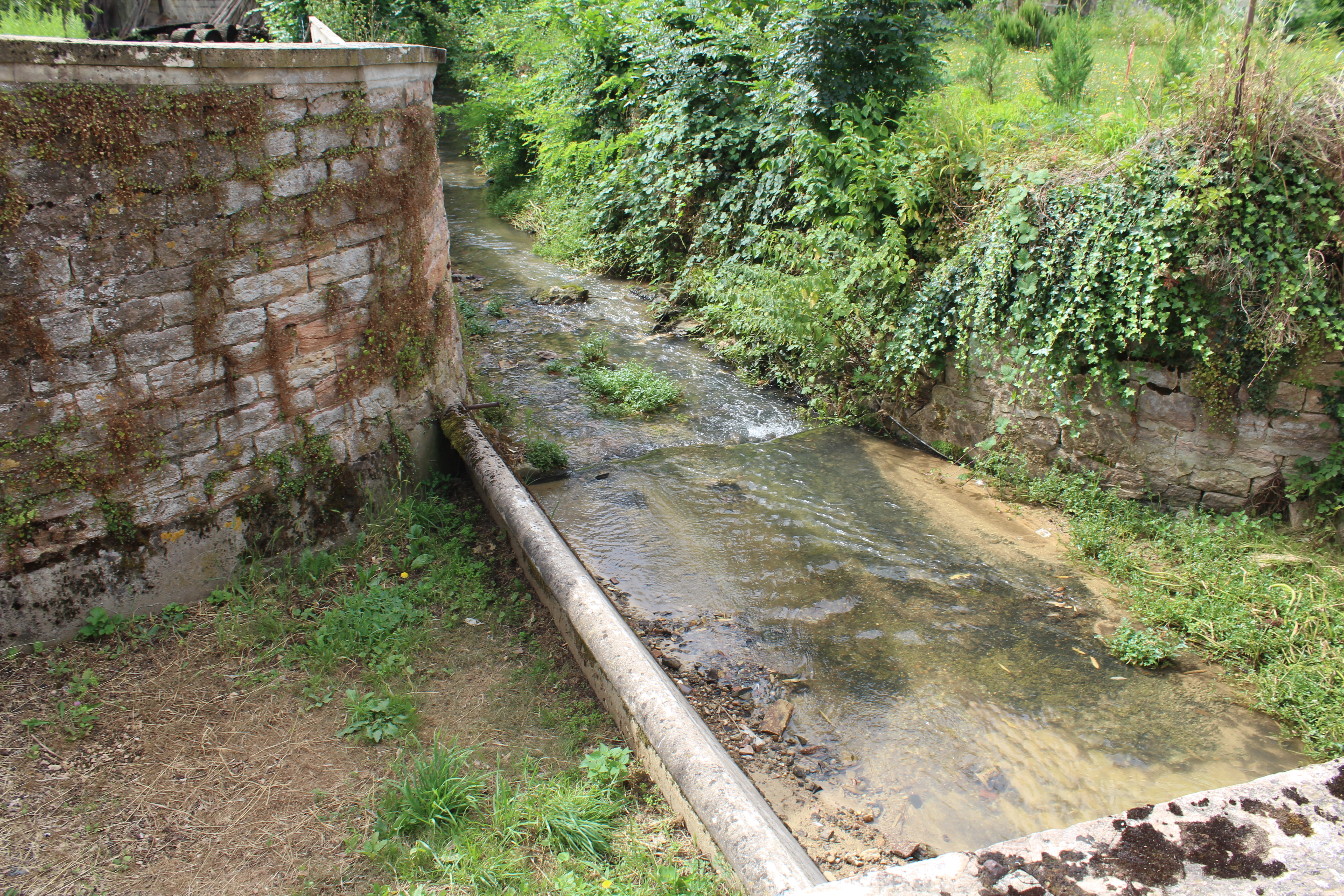 Le ruisseau de l'Abyme à Flacé, quartier de Mâcon.